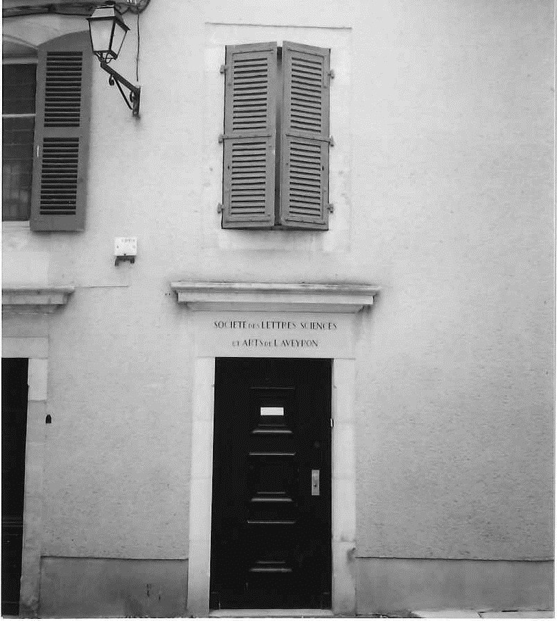 rodez